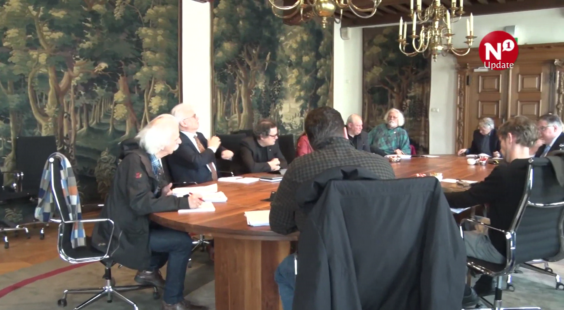 Het College van B&W Nijmegen in vergadering op 14 maart 2017.